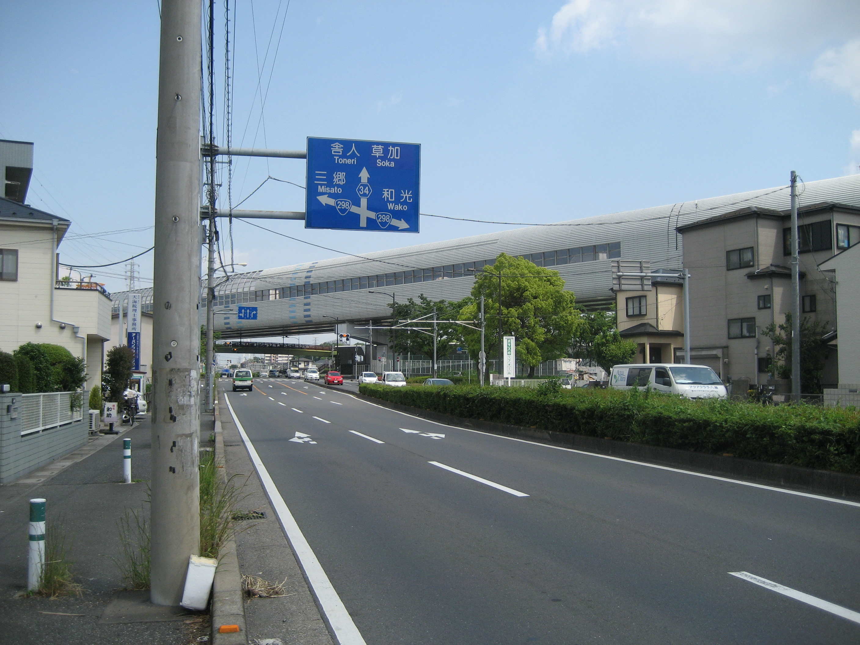 埼玉県道1号線国道298号線との交差点付近（川口市道合西交差点付近）